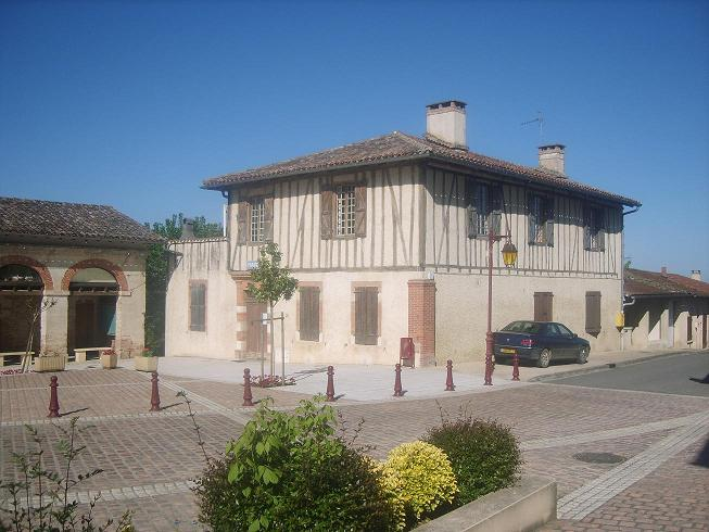 Mairie d'Endoufielle, 32600, Gers.